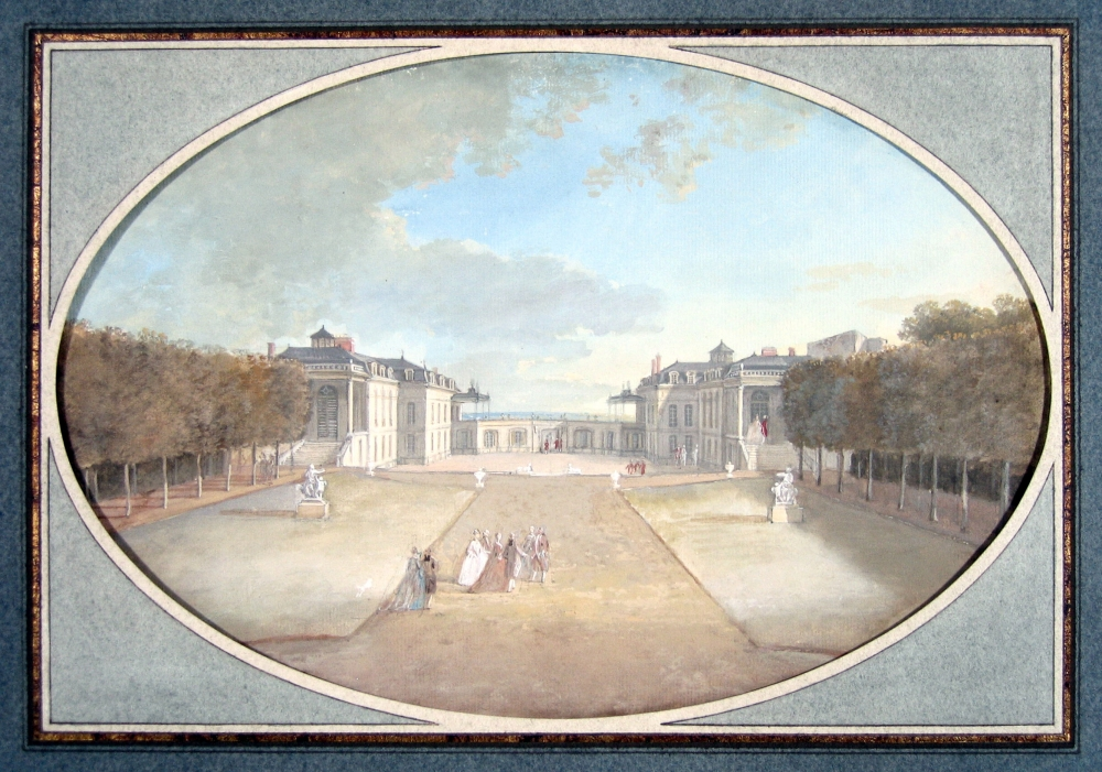 Vue de l'hôtel de Valentinois (côté jardin)